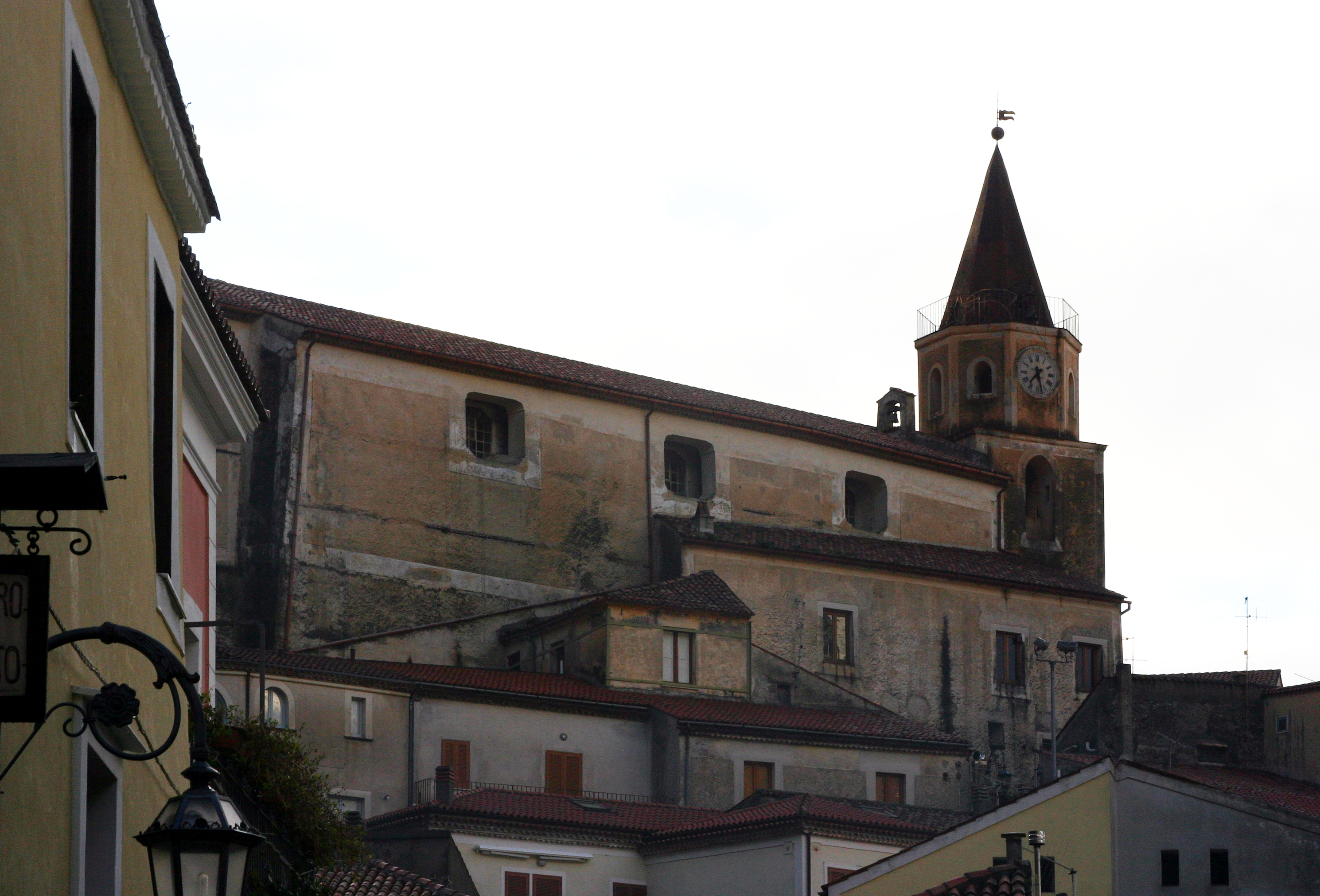 Maratea